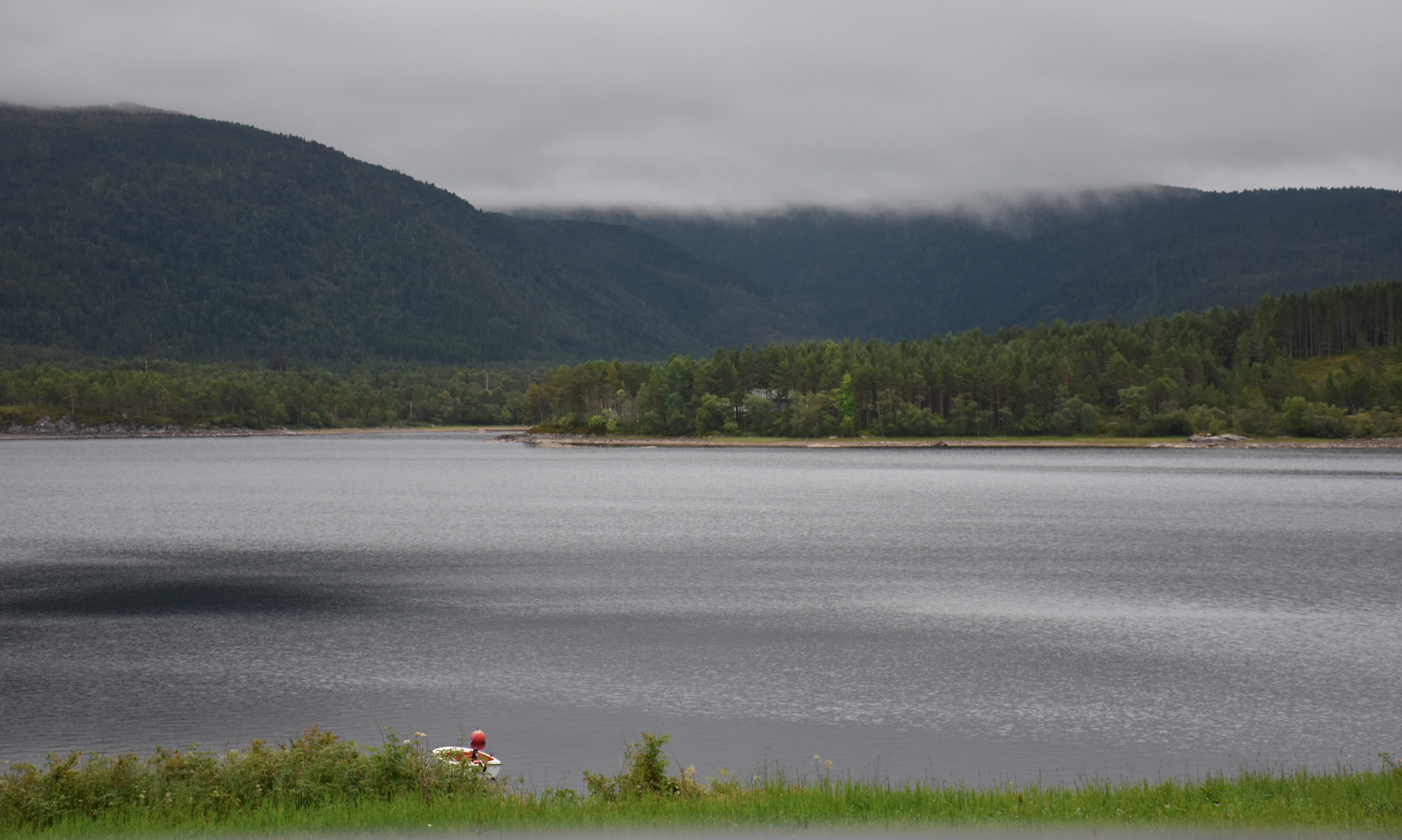 Storvatnet i Averøy